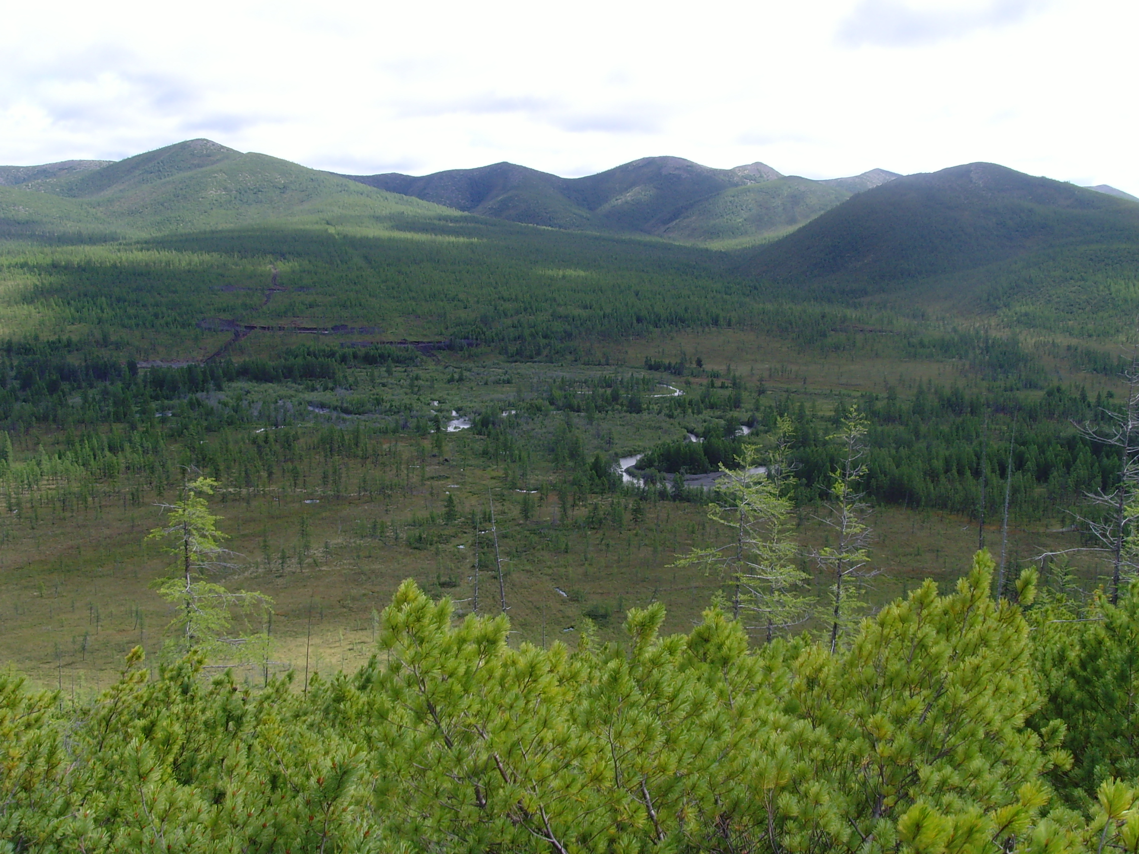 Долина р. Интриган